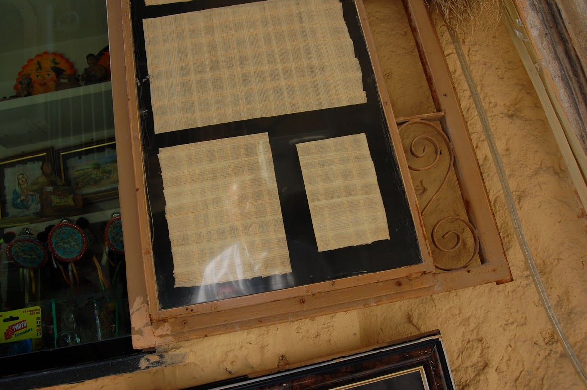 Carta prodotta artigianalmente dal papiro siracusano